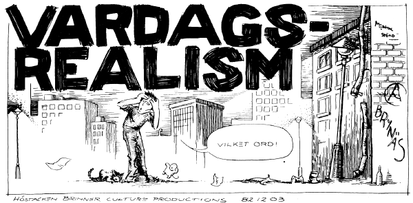 Nicolas Križan, första rutan i serien "Vardagsrealism", tecknad 1982 för Seriefrämjandets medlemstidskrift ToTS 1/1983. Återtryckt i samlingshäftet Lillen igen 1985 (sid 4).